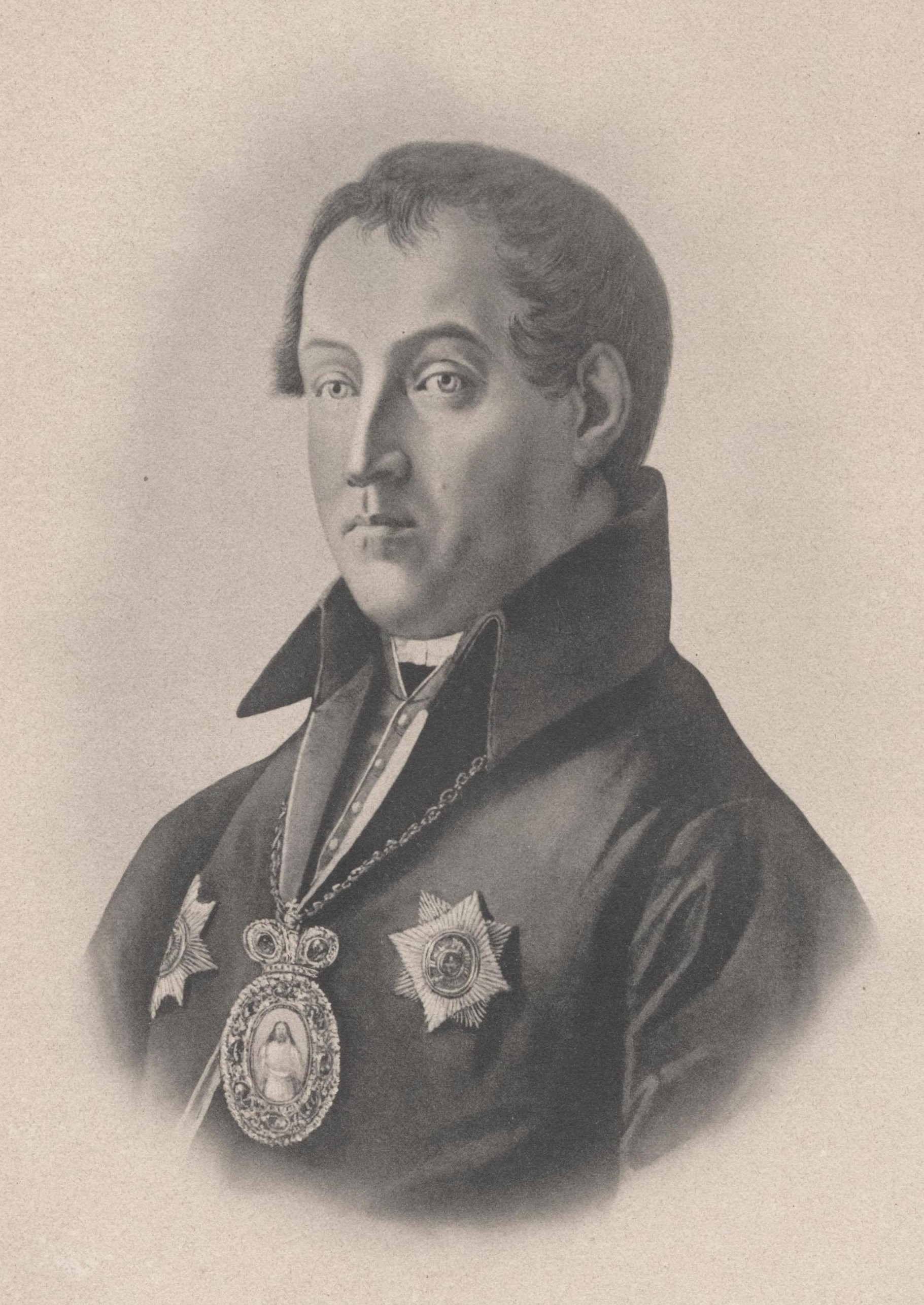 Иосиф Семашко, литовский греко-униатский епископ, впоследствии литовский православный митрополит С. 142